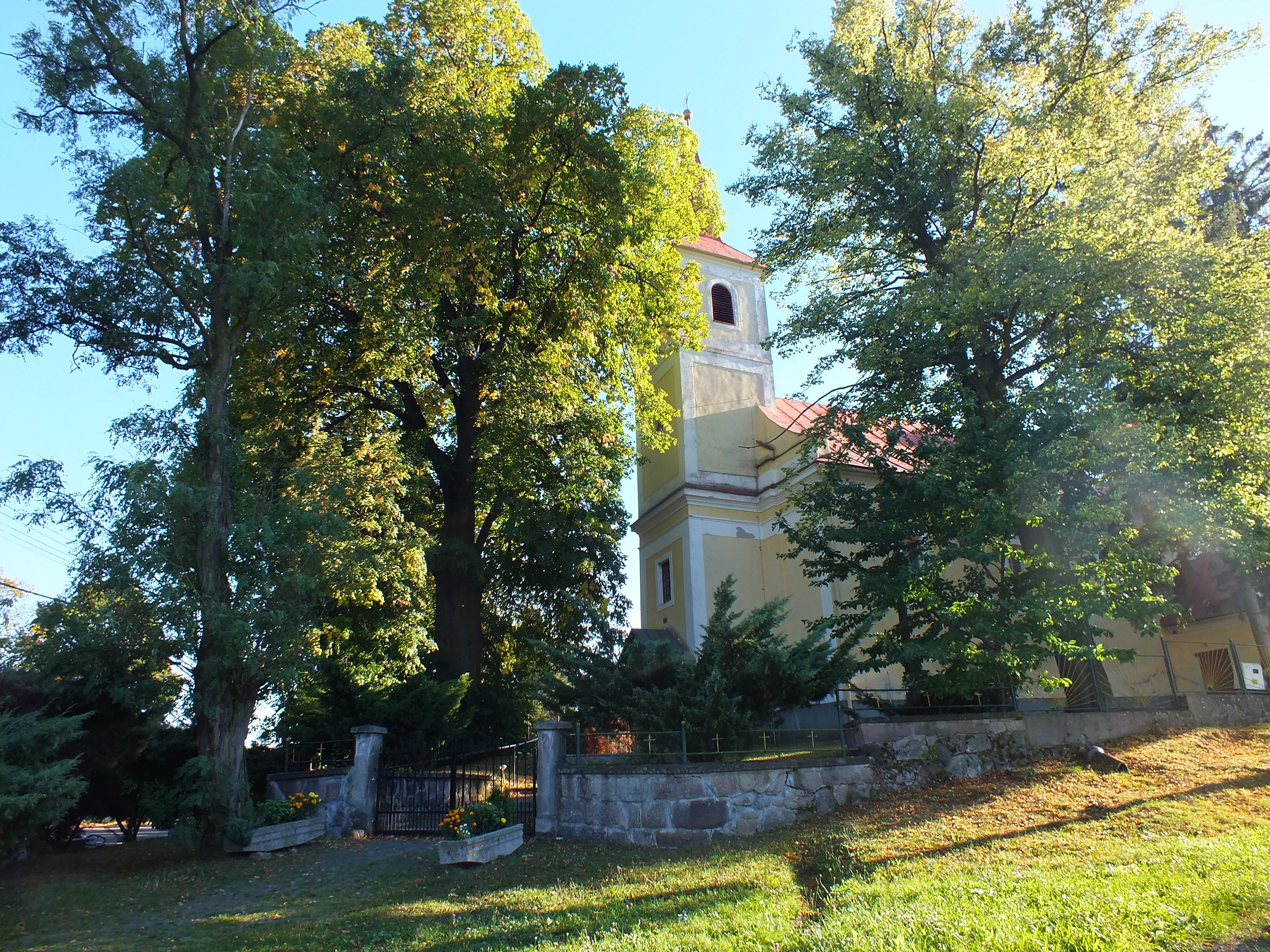 Kostol